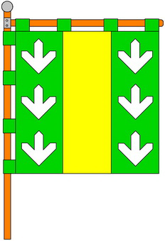 Хоругва смт Великыїі Бірки